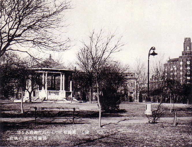 原标题：被建成圆形的别有趣味的园林，法兰西公园的风景。